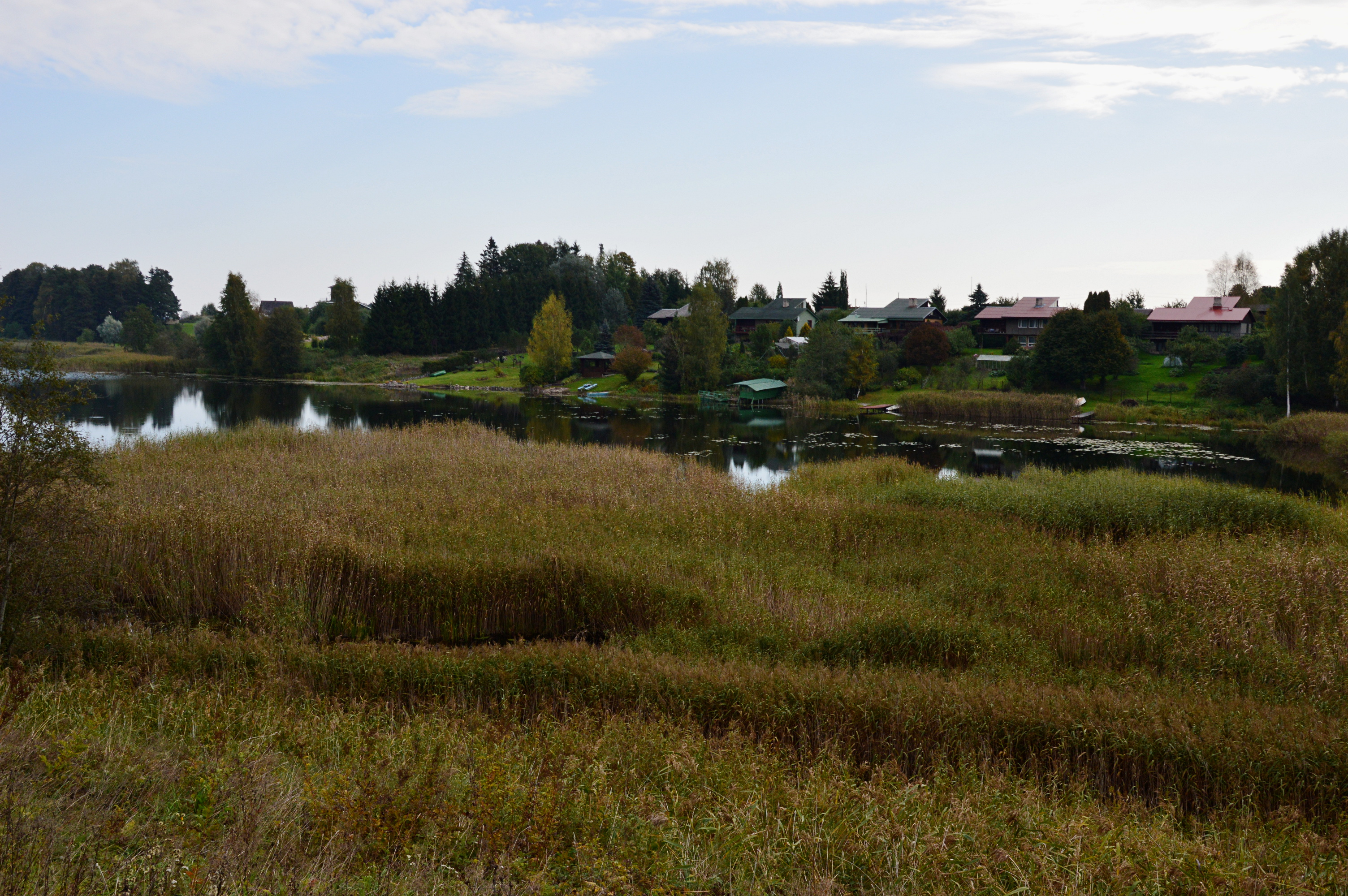 Lavatsi järve hoiuala lõunaosa. Pildistatud põhjakaldalt.